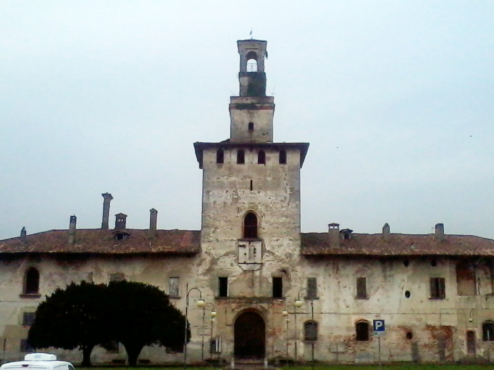 Facciata del Castello di Cusago (MI) - Italy